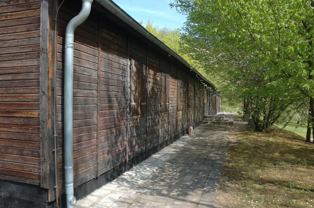 HÃ¤ftlingsbaracke